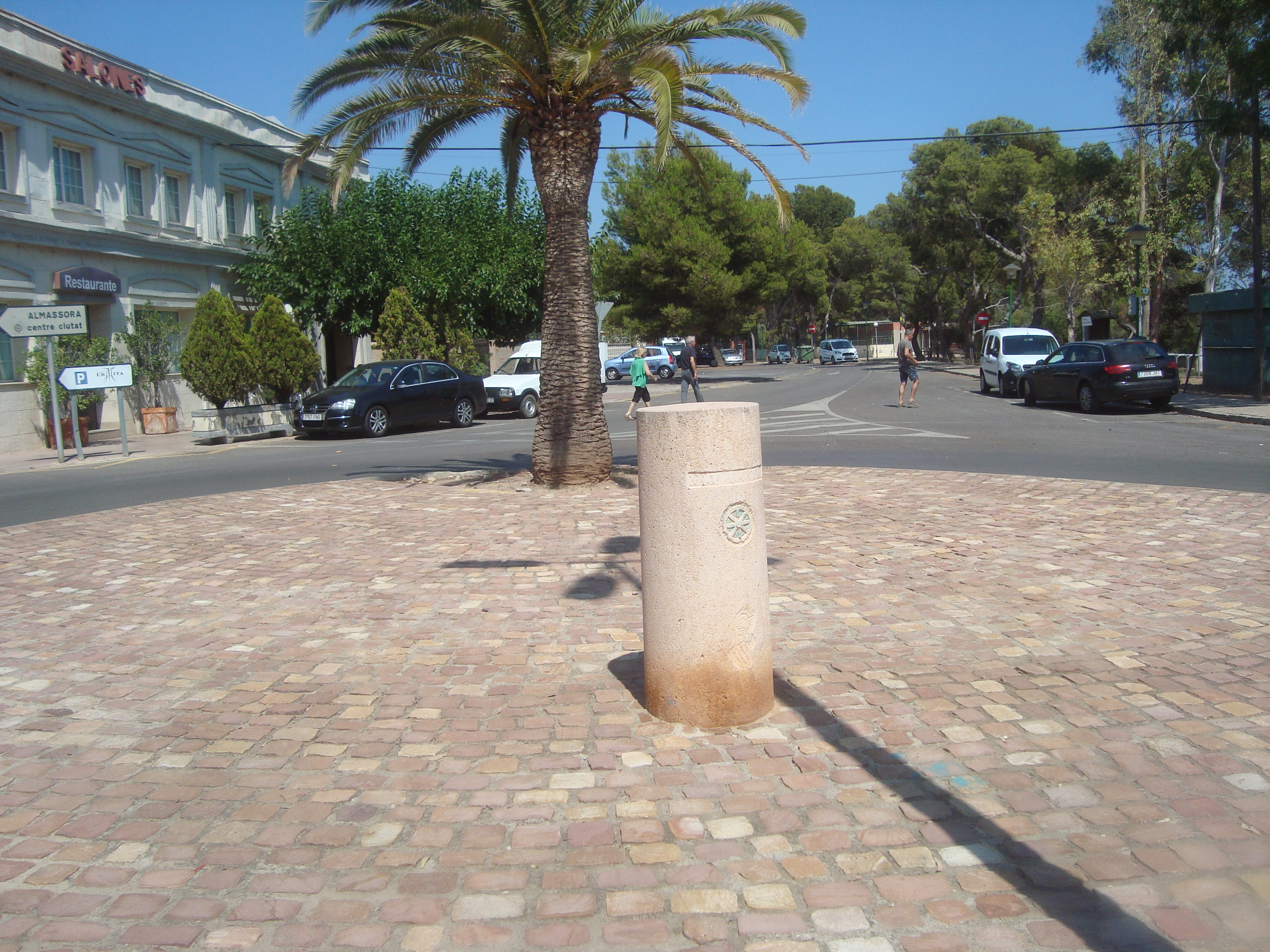 Vía Augusta en route pour Almassora Vía Augusta 05.009-022.